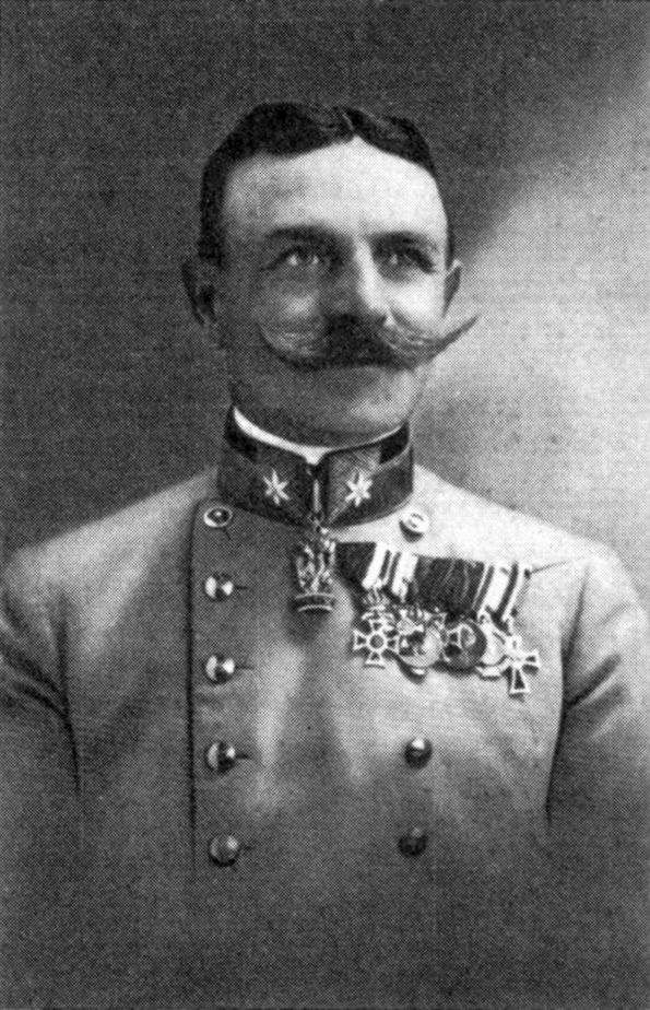 Hermann Kusmanek von Burgneustädten (1860-1934), Austrian General